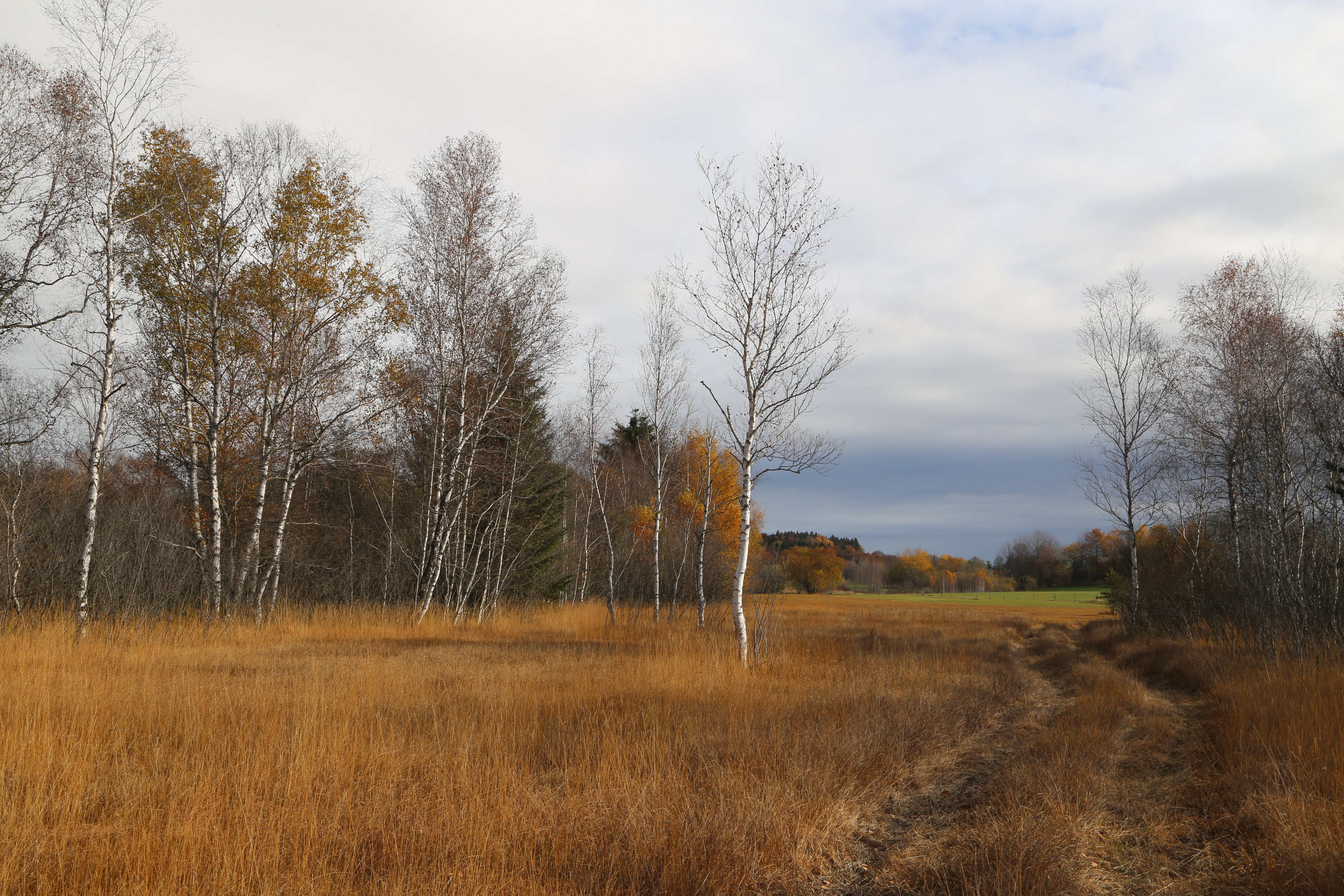 Wattersdorfer Moor, Weyarn; LSG-00434.01